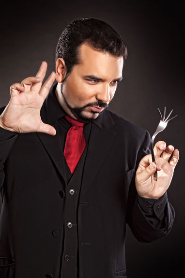 Fotografia promocional del mentalista español Manolo Talman